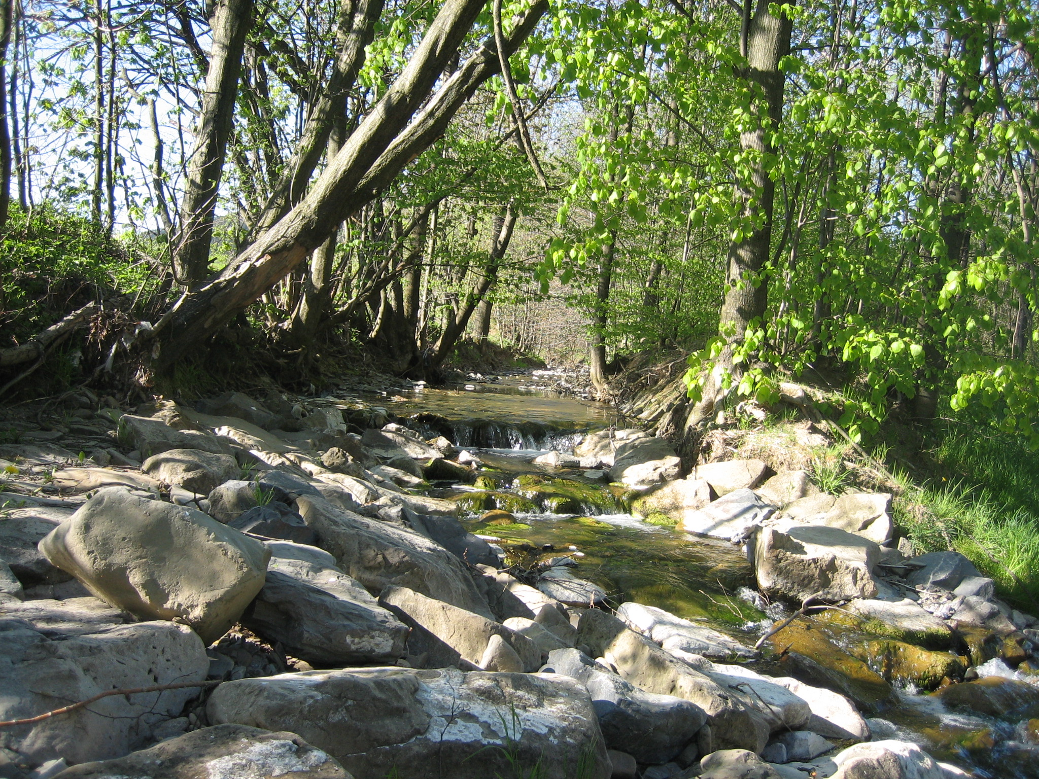 Lušovský potok nad ústím do Vsetínské Bečvy